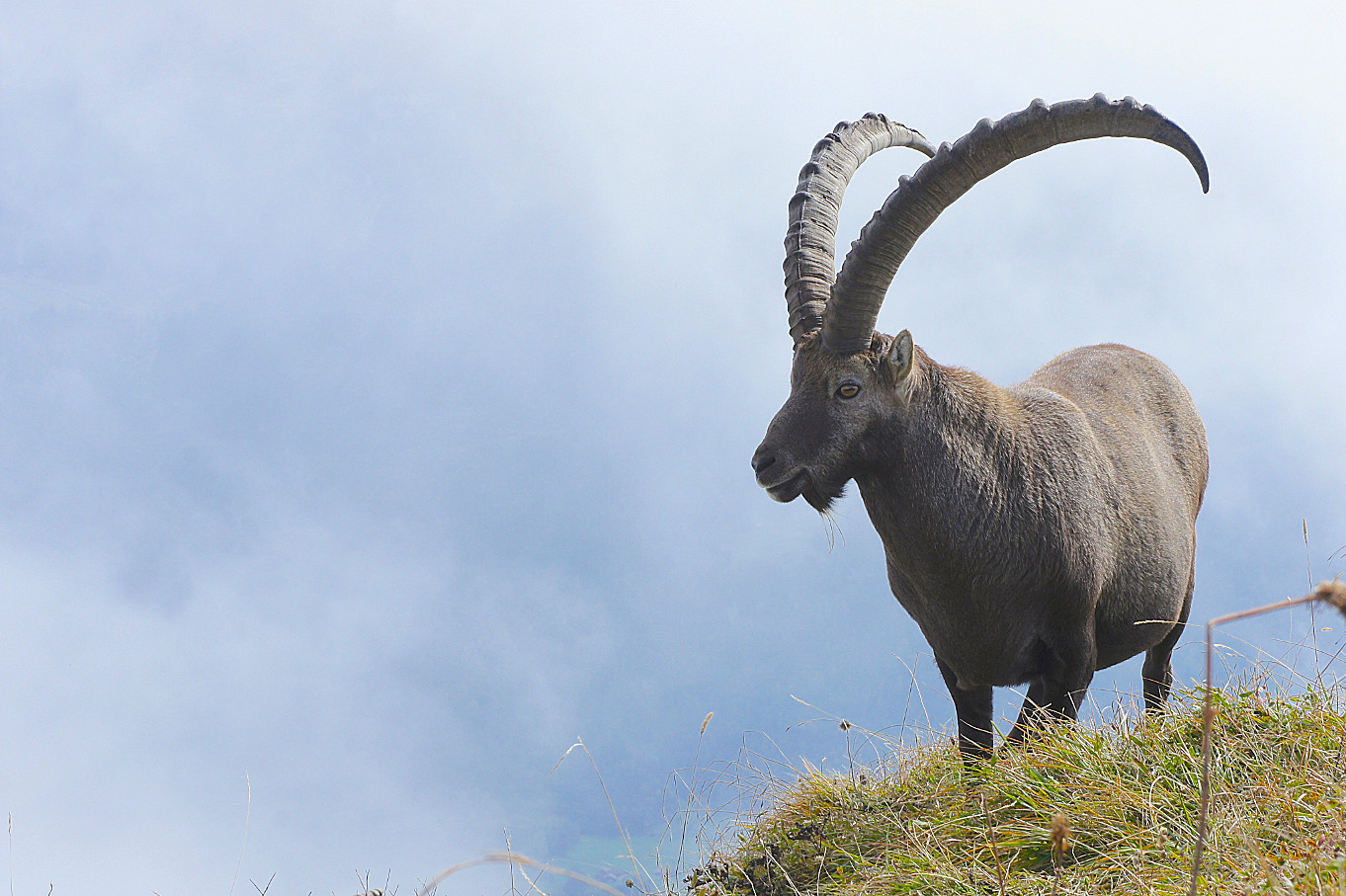 Alpensteinbock auf dem Augstmatthorn über dem Brienzersee